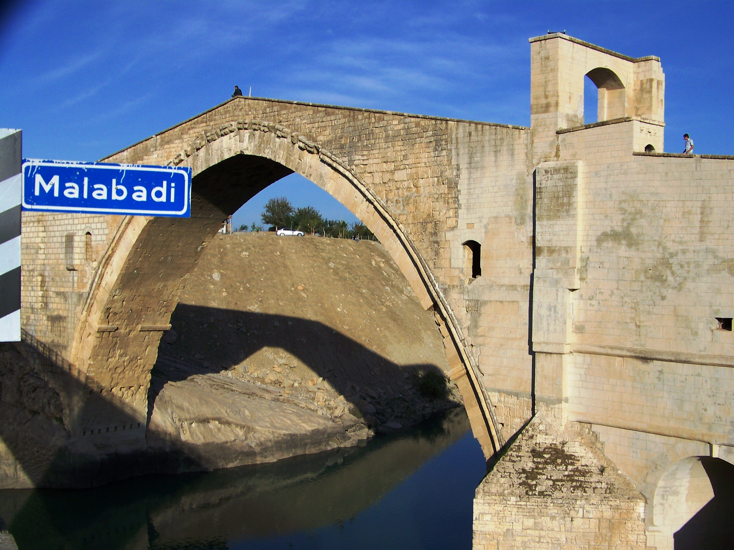 Malabadi Köprüsü, Silvan - Diyarbakır